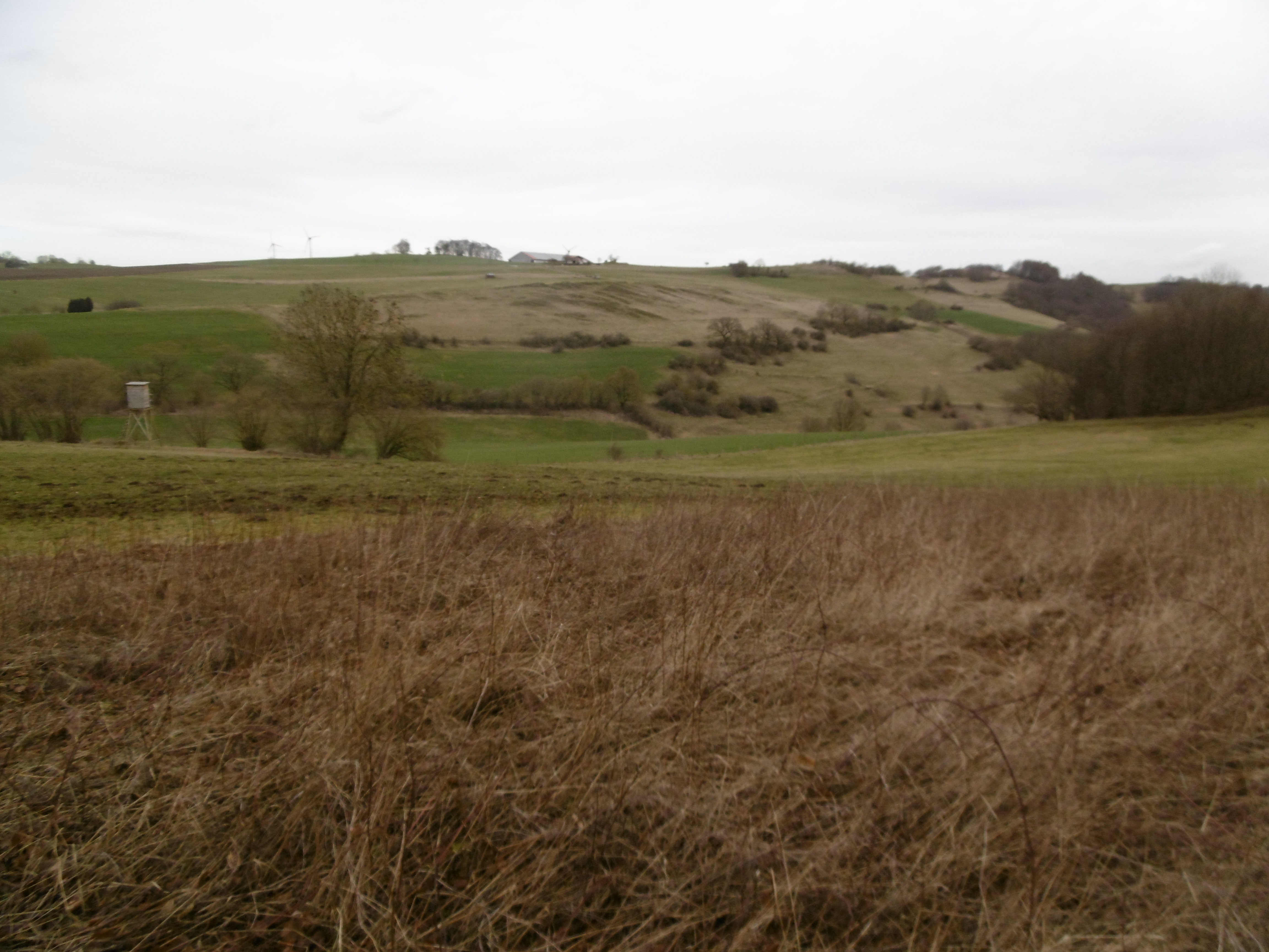 Westteil vom Naturschutzgebiet Egge (Brilon) vom südlichen Gegenhang.